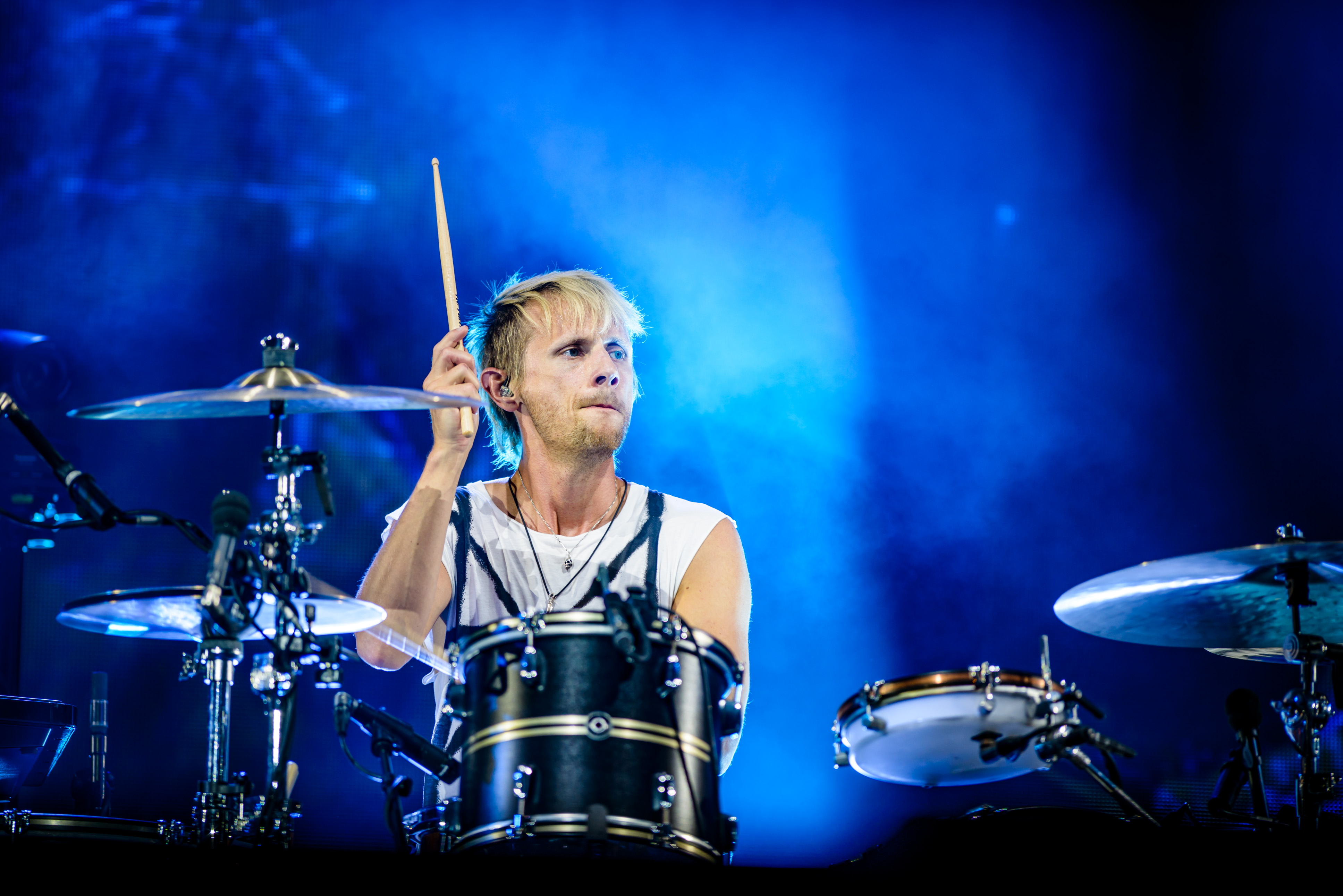 'Rock im Park 2018; Zeppelinfeld Nürnberg': 'Muse'